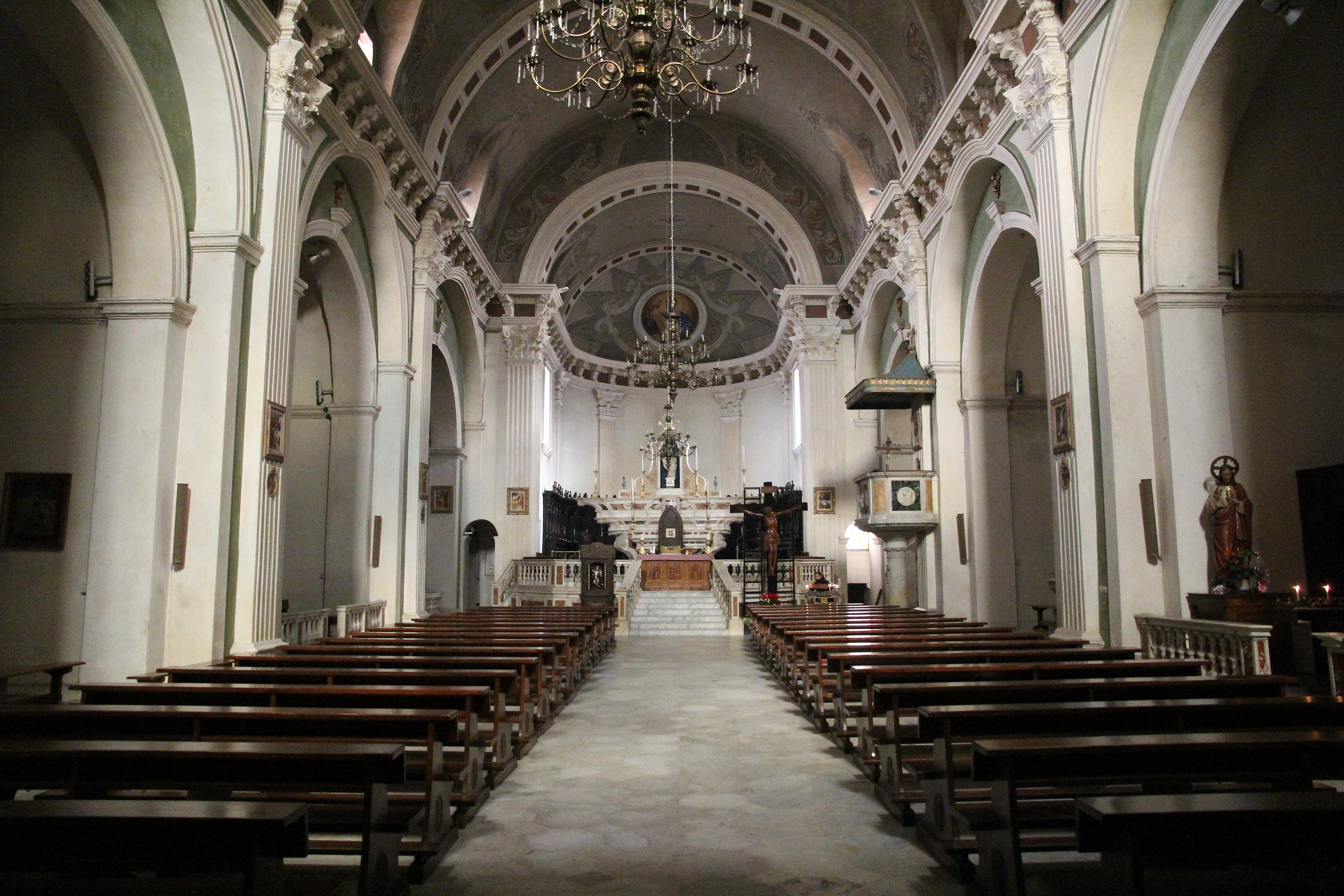 Tempio Pausania, chiesa di San Pietro